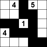 Egen teckning